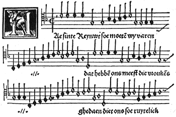 Bladzijde uit het Kamper Liedboek (± 1540-1542), gedrukt in Kampen bij Johannes Petrejus (of Jan Peterszoon).